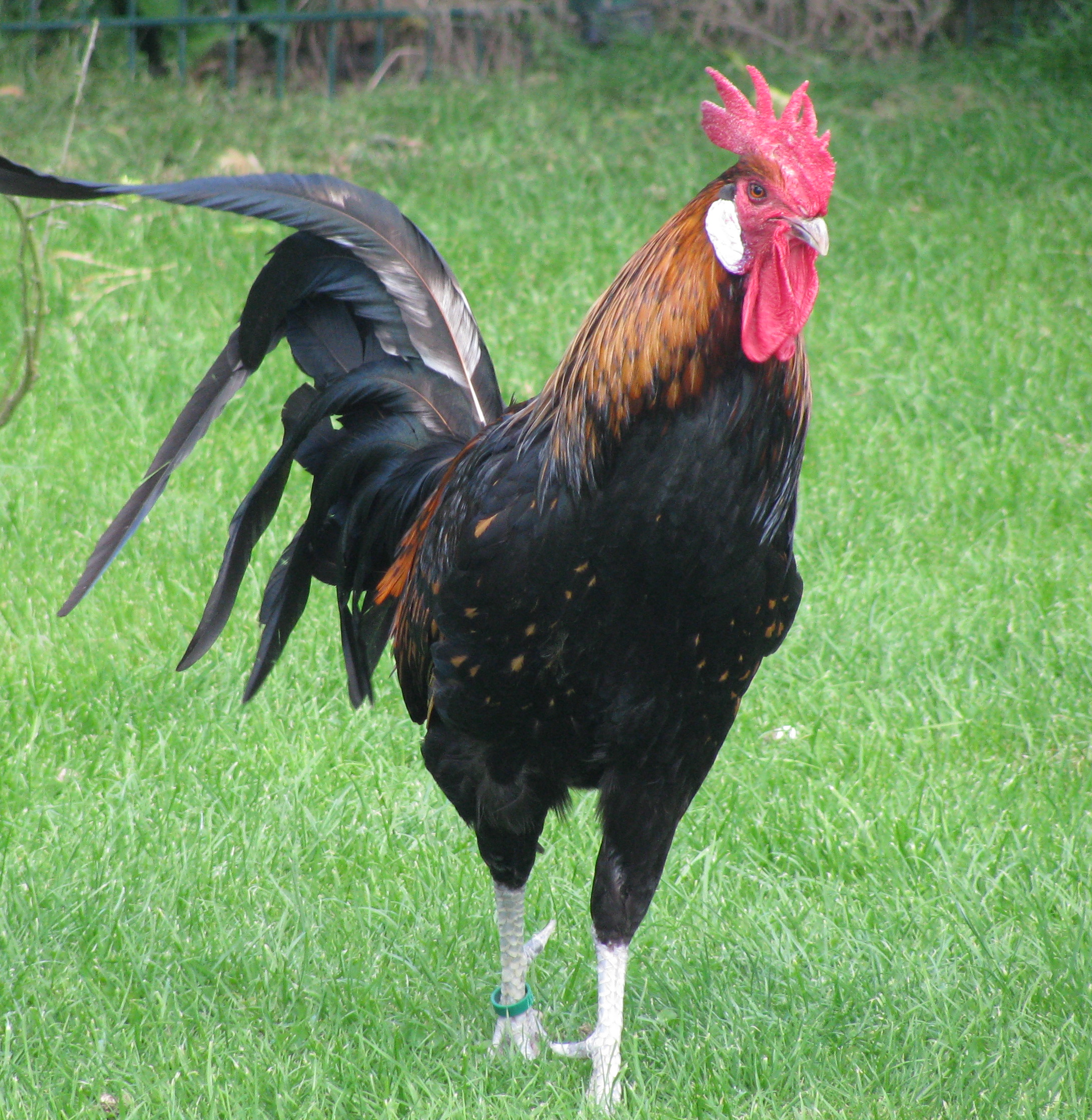 Hahn der Rasse Bergische Kräher, aufgenommen im Wissenschaftlichen Geflügelhof Sinsteden